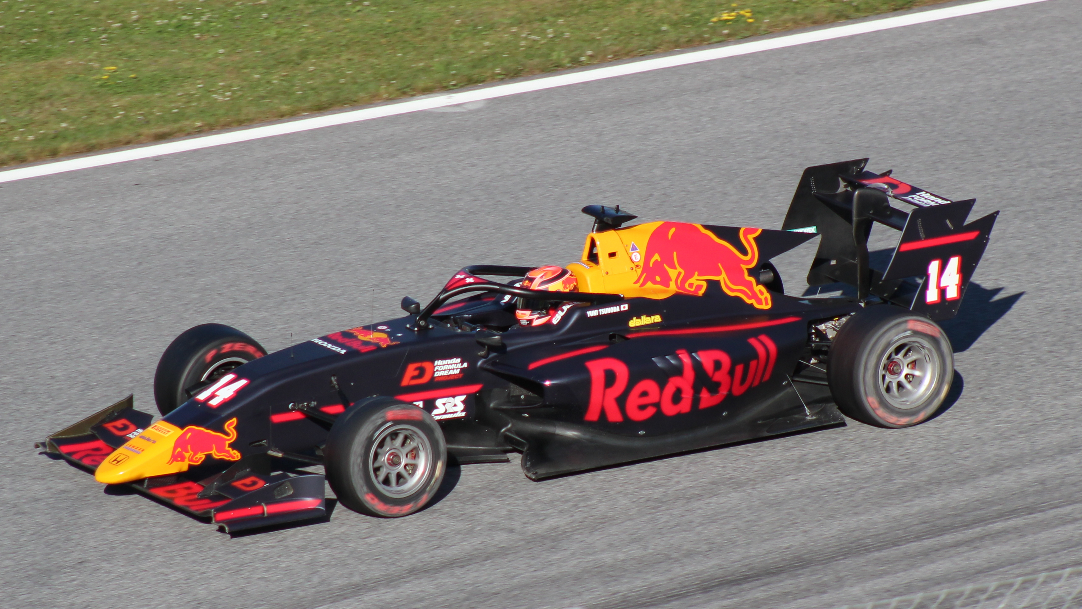 Tsunoda beim Rennwochenende in Österreich 2019